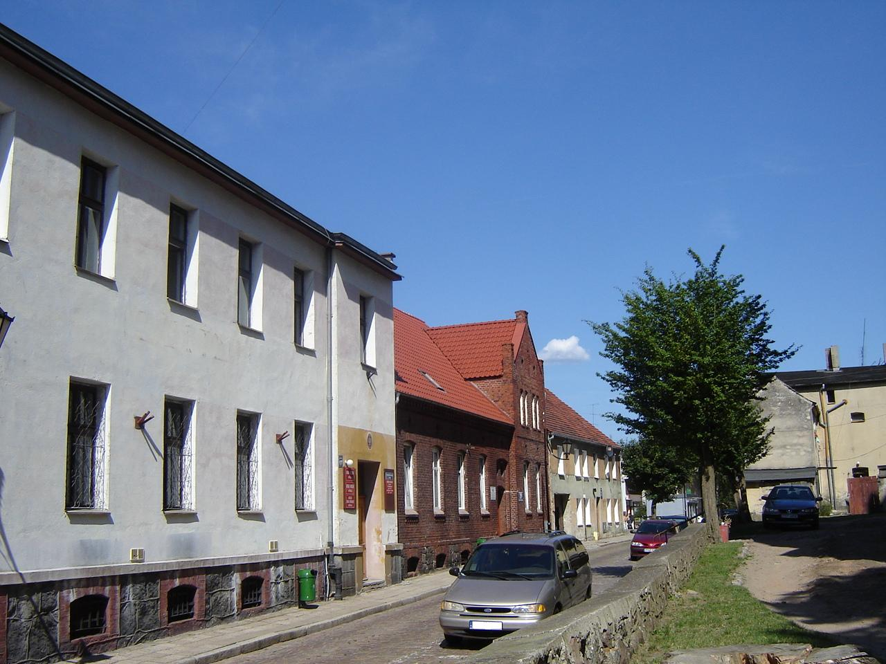 Urząd Miejski w Reczu